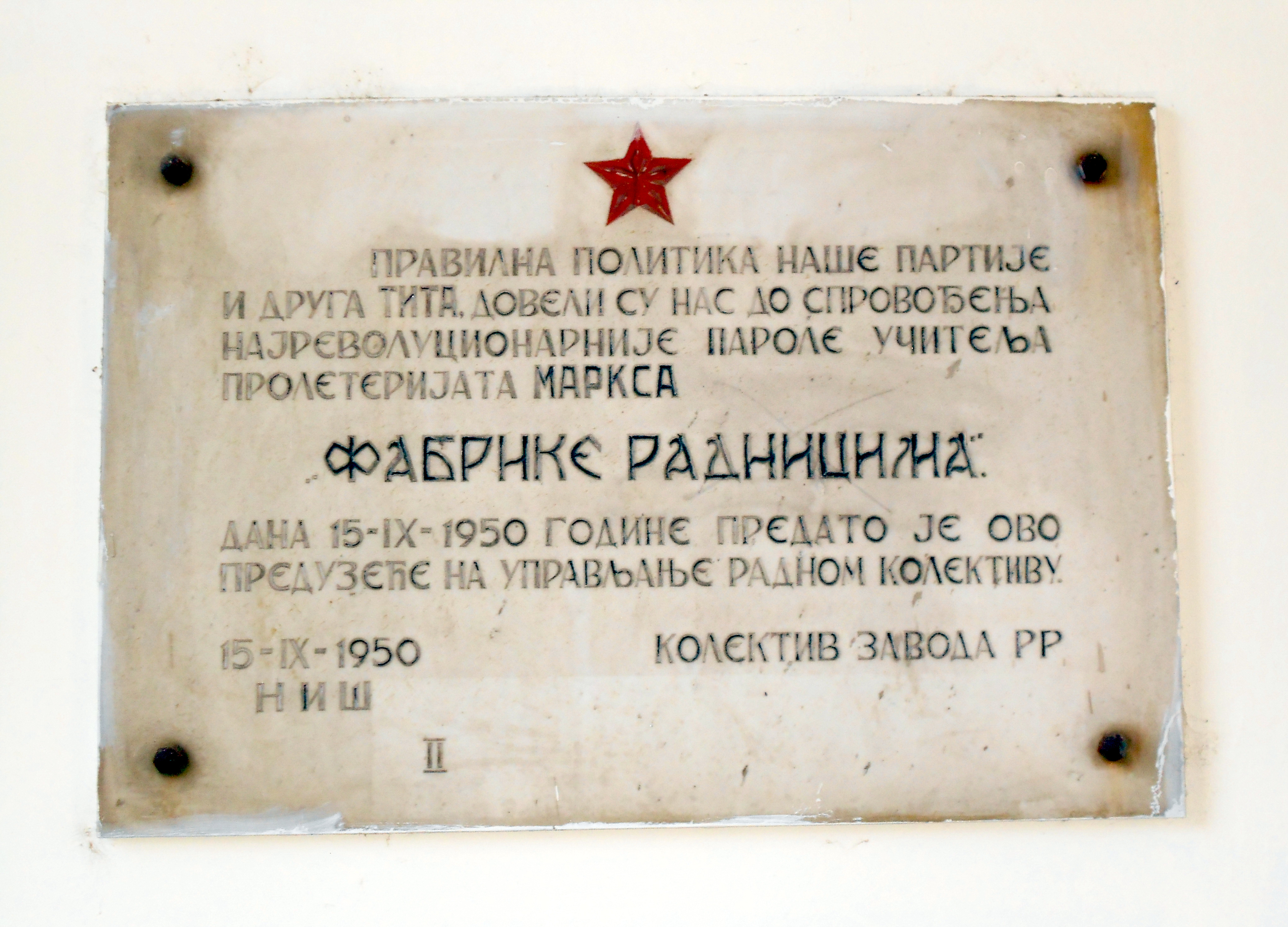 Драган Цветковић Ниш Сопствена слика Табле у електронској индустрији ниш "фабрике радницима"